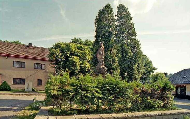 náves v Pohledu autor::Zp